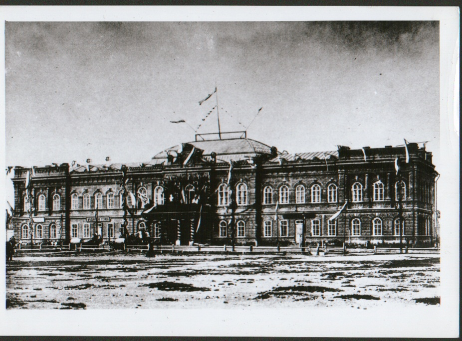 г. Иркутск. Городская Дума 1892-1895г. арх. В.А.Рассушин.